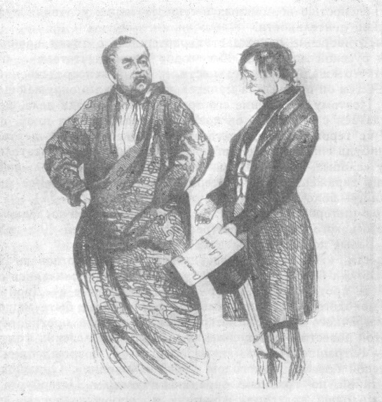 Рисунок П. А. Федотова к рассказу Ф. М. Достоевского "Ползунков"